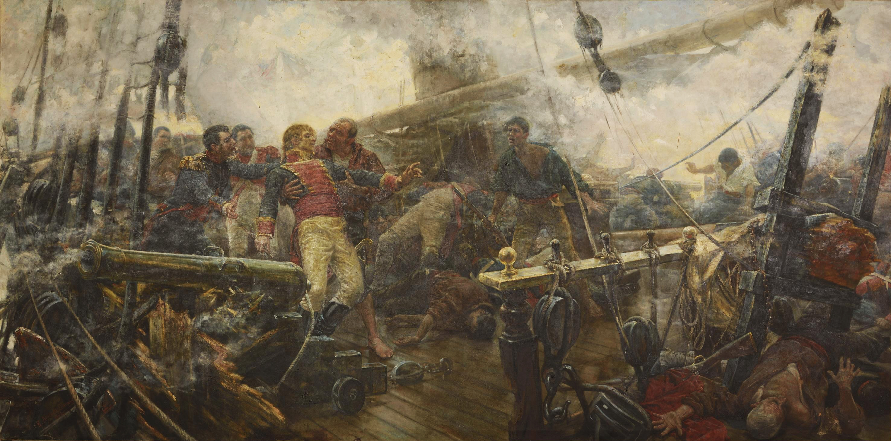 La obra representa la muerte del brigadier español Cosme Damián Churruca (1761-1805), que murió durante la batalla de Trafalgar cuando comandaba el navío de 74 cañones San Juan Nepomuceno.